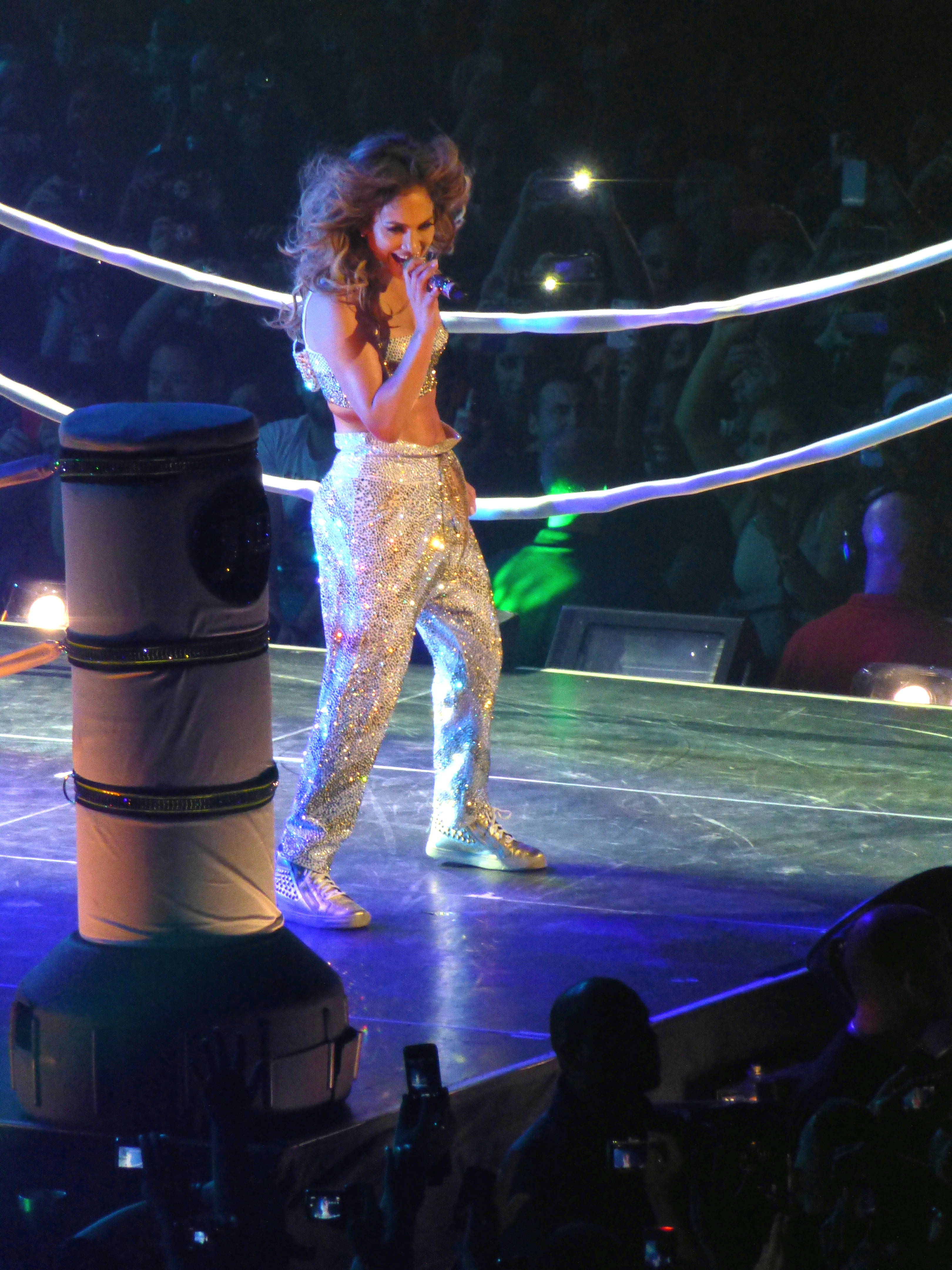 Jennifer LOPEZ en concert à Paris Bercy dans le cadre du " DANCE AGAIN WORLD TOUR " en OCTOBRE 2012